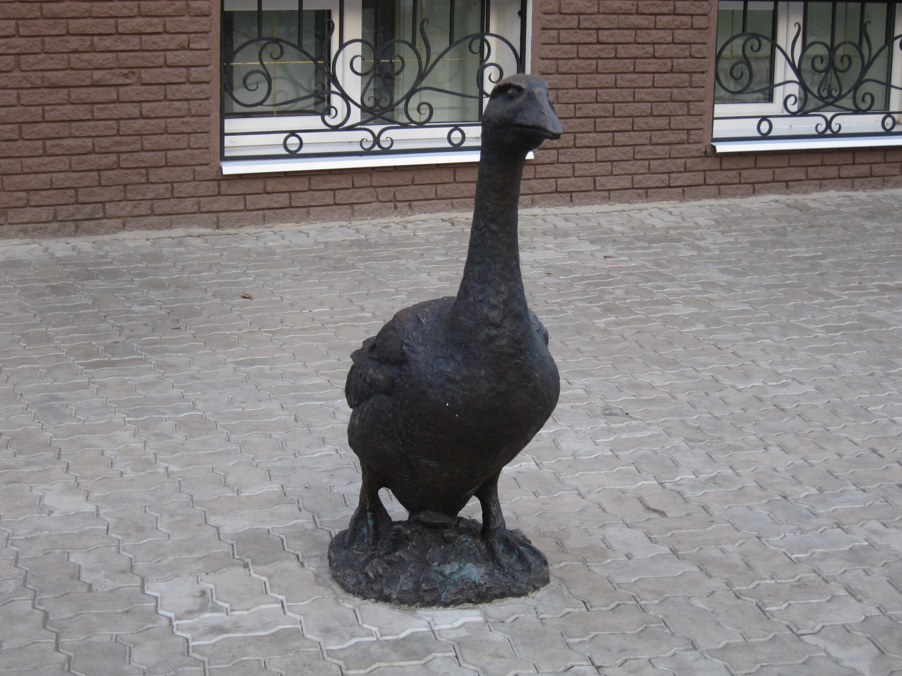 Gänse